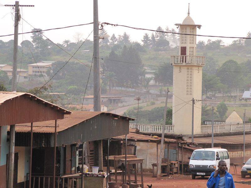 Vue de la ville de Moanda au Gabon